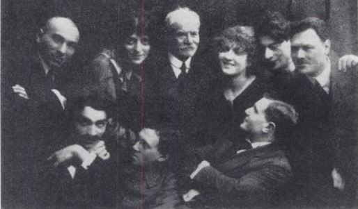 Foto der Wilnaer Truppe von 1918 oder 1919: Stehend: Noah Nakhbush, ?, Jacob Dineson (Author), ?, Sonia Alomis (Schauspielerin),?,David Hermann (Regiseur) Sitzend: Boaz Karlinski, ?, Chaim Shneyer